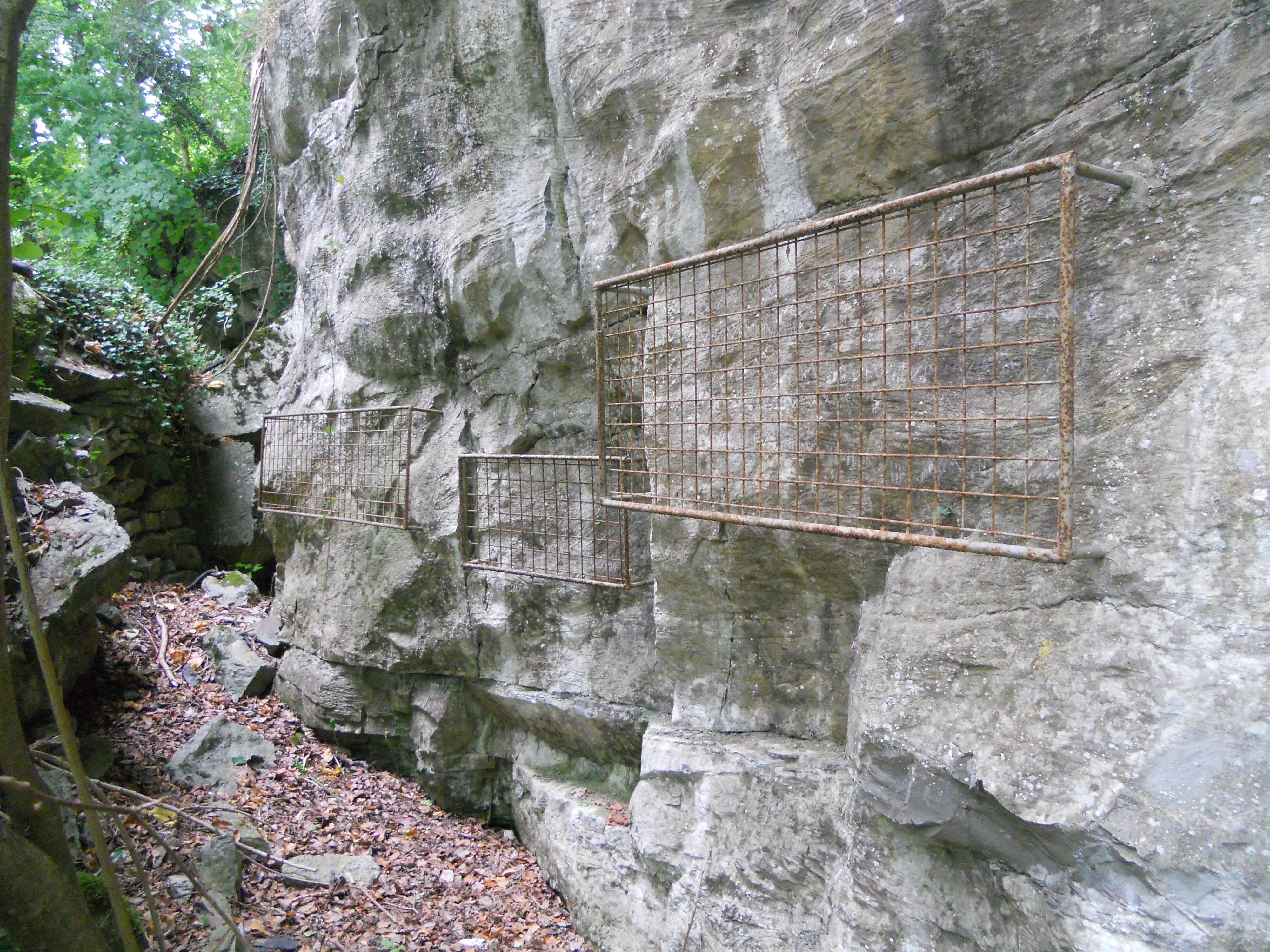 Ecritures de Maizeret derrière leurs grilles de protection.